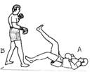 voyage1.jpg